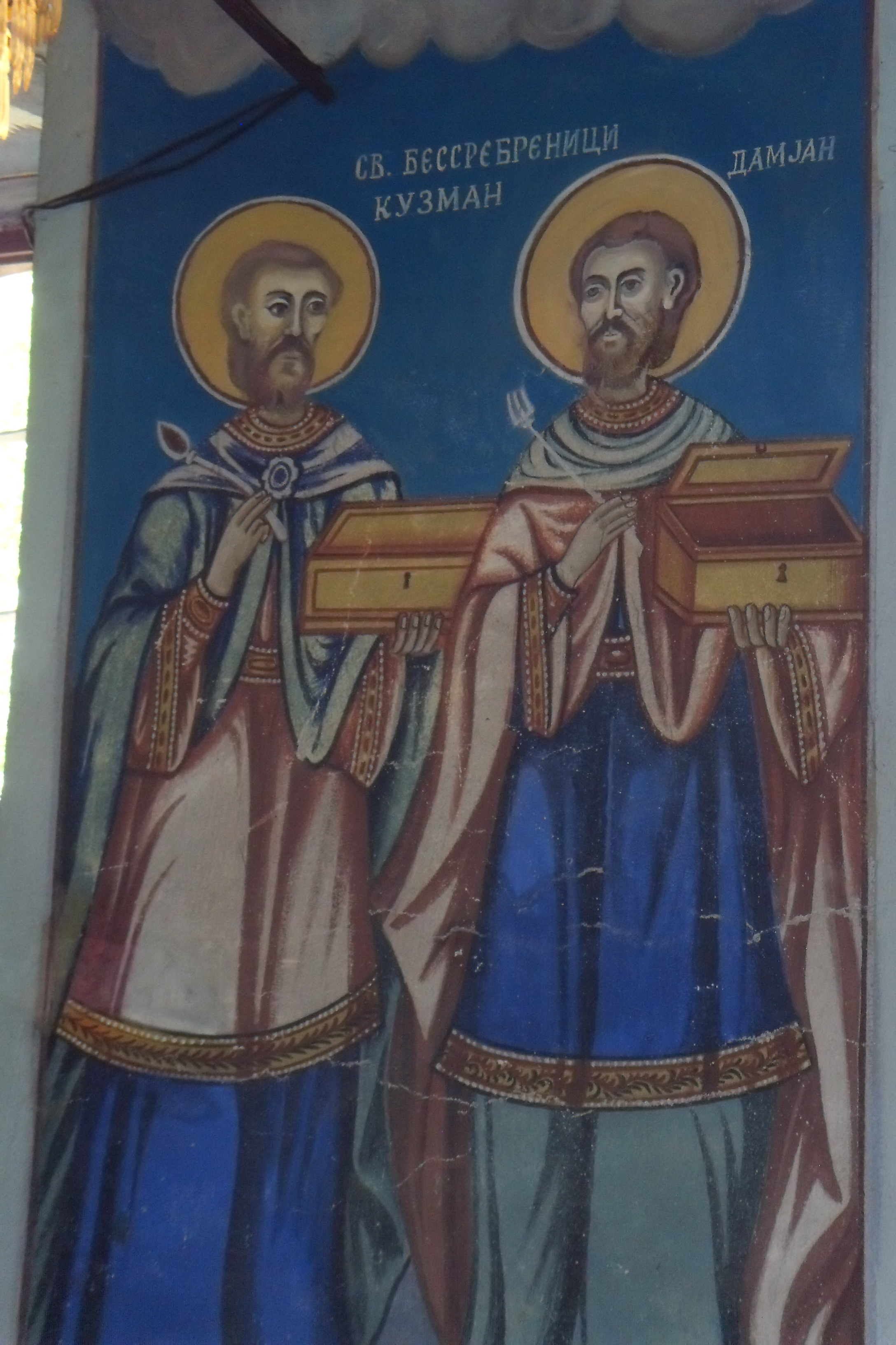 Црквата Св. Јован Крстител во с. Доброште, Тетово, Македонија